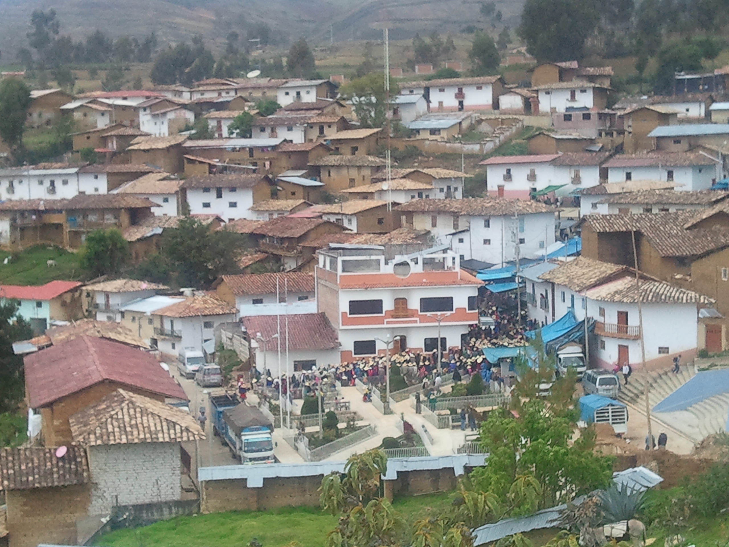 Plaza de Cachachi